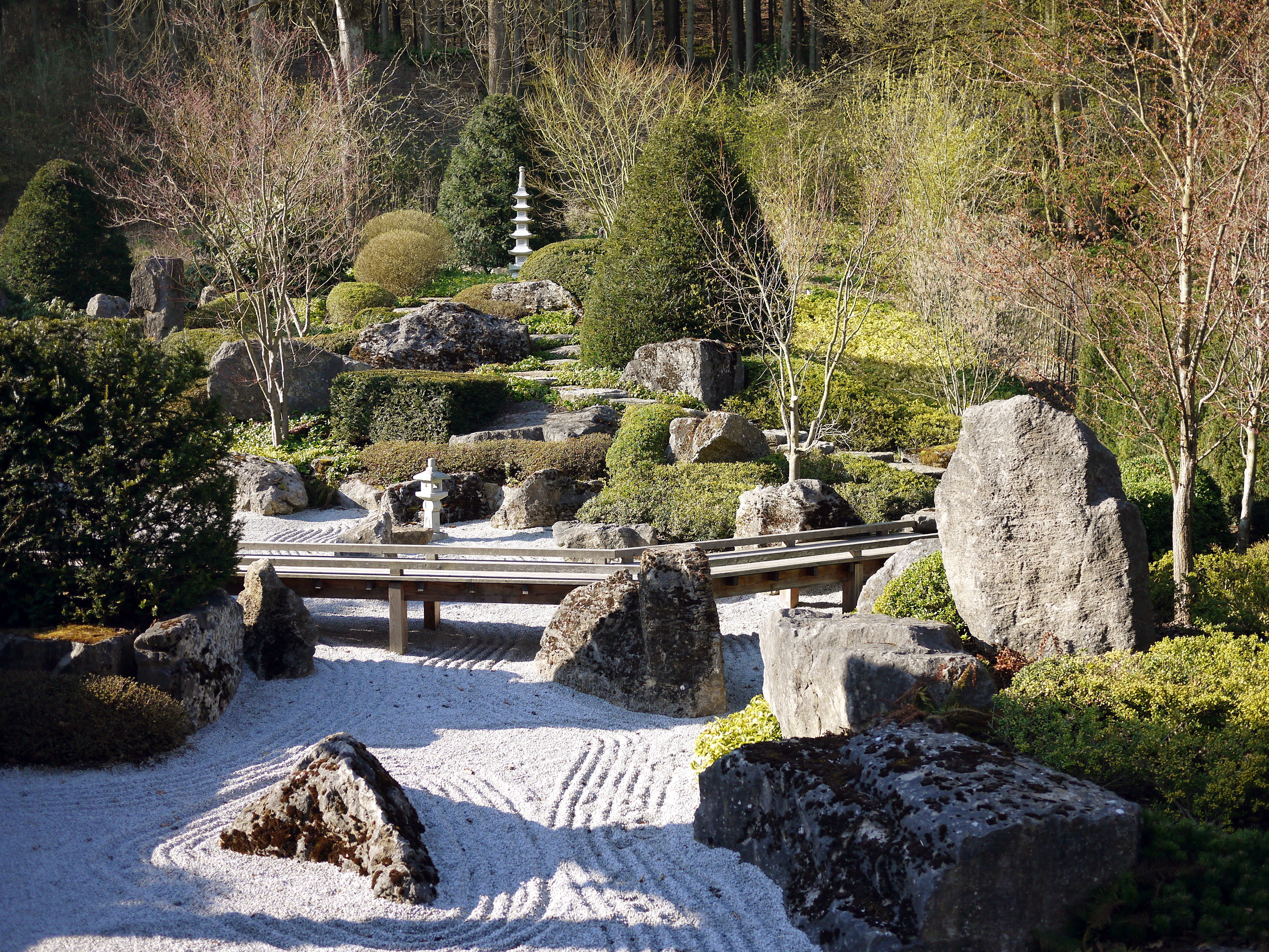 Zengarten des Benediktushof in Holzkirchen